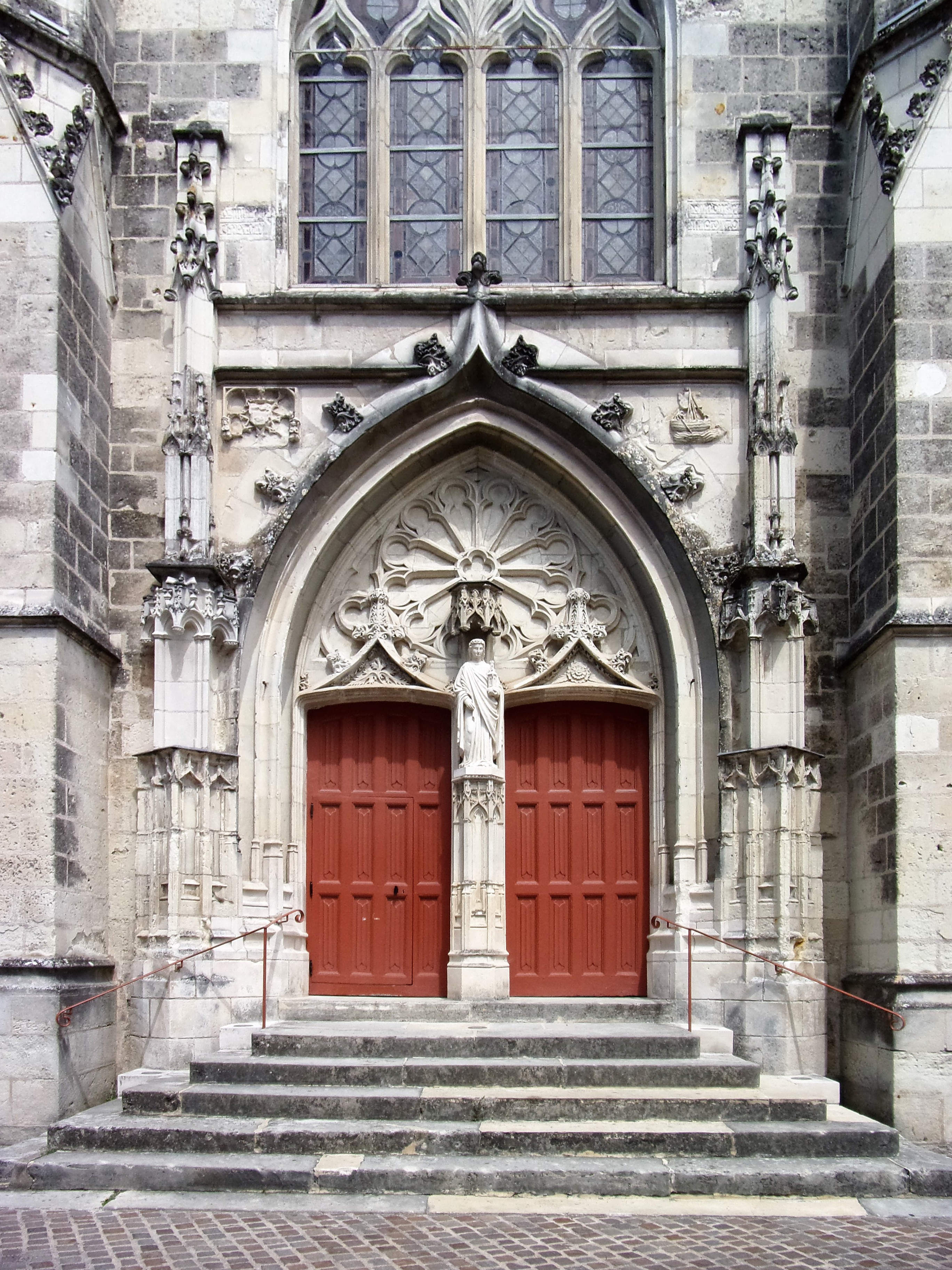 Portail de l'église Saint-Symphorien de Fondettes